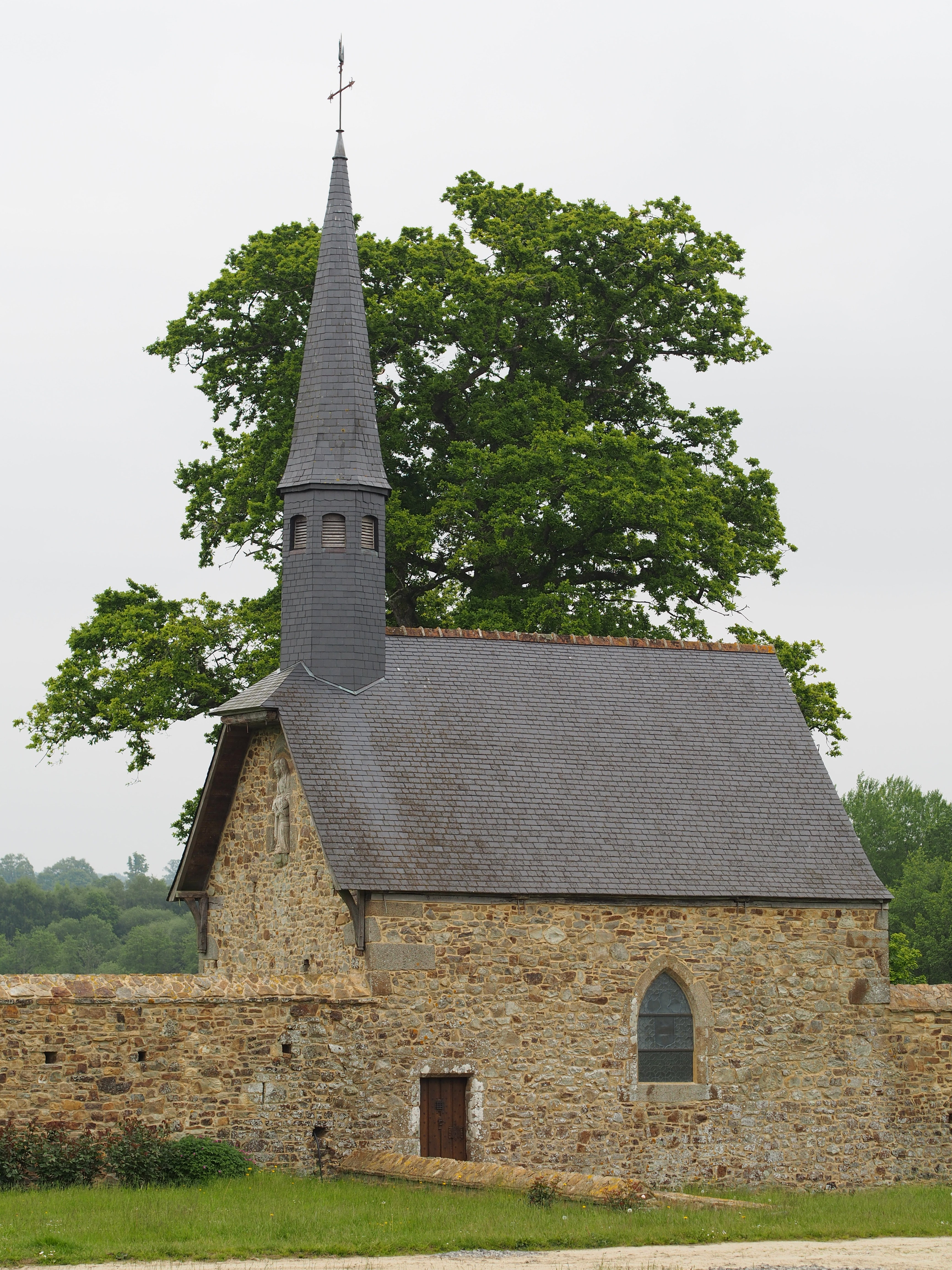 Chapelle du Manoir de la Chaslerie, à La Haute-Chapelle (France).